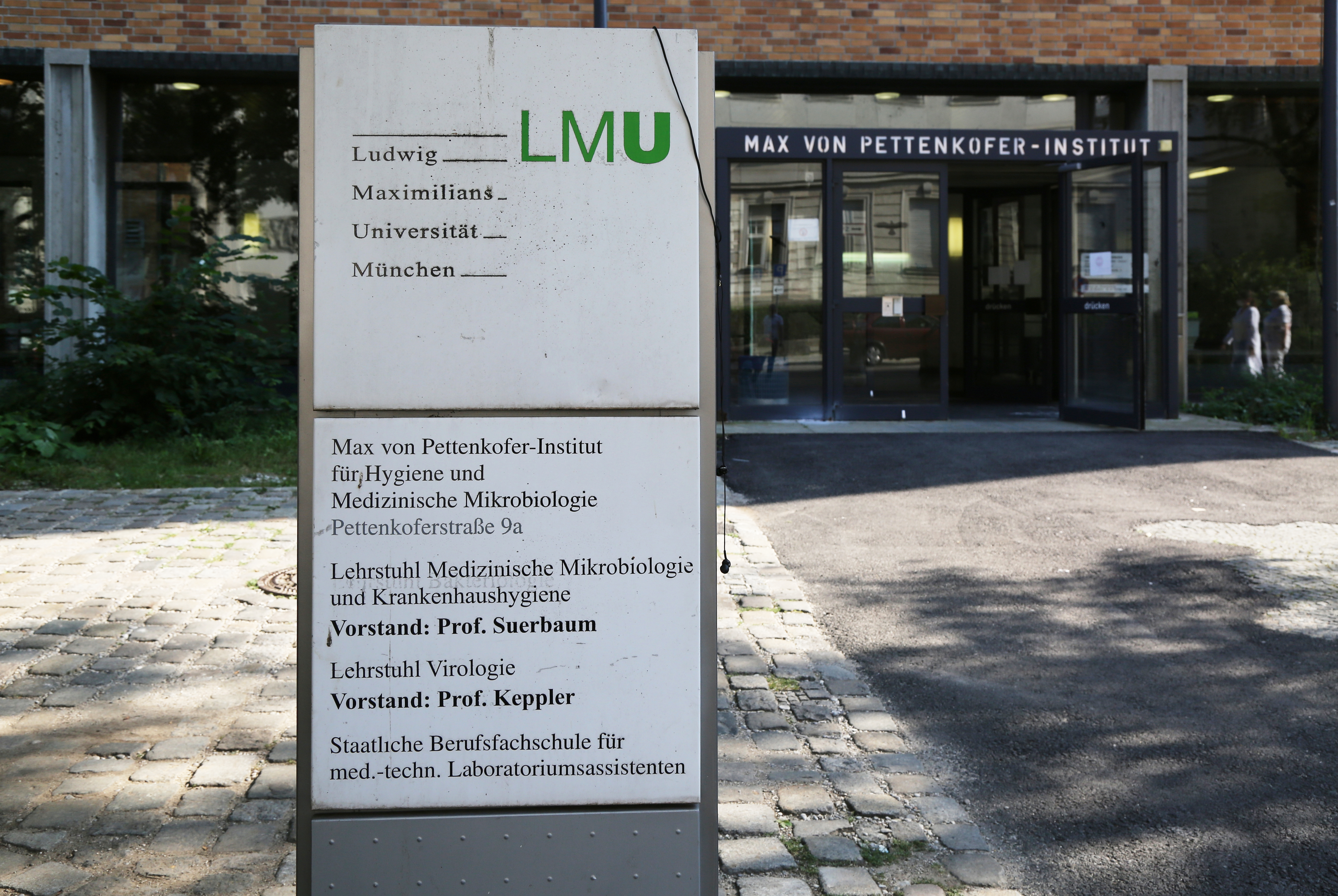 Max-Pettenkofer-Institut des Innenstadt-Kliikums der Ludwig-Maximilians-Universität München